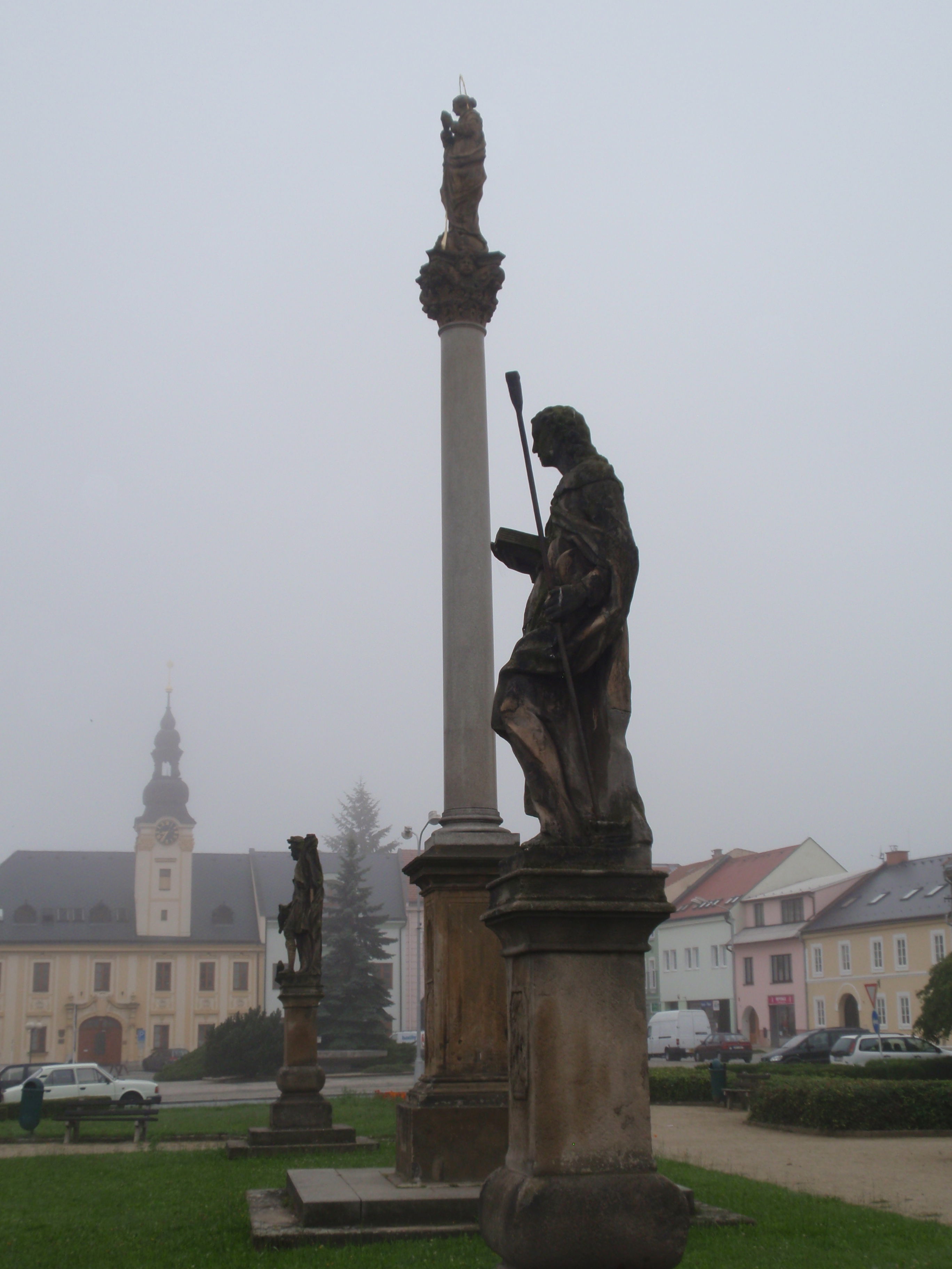 Sloup morový se sochou P. Marie a sochami sv. Floriána a sv. Vendelína (Kojetín), Masarykovo nám., Kojetín